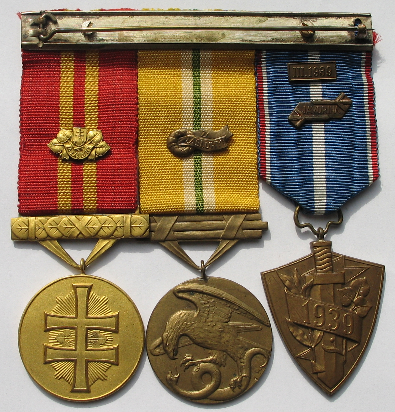 Vojenské vyznamenania vojakov vojnovej Slovenskej republiky v rokoch 1939-45